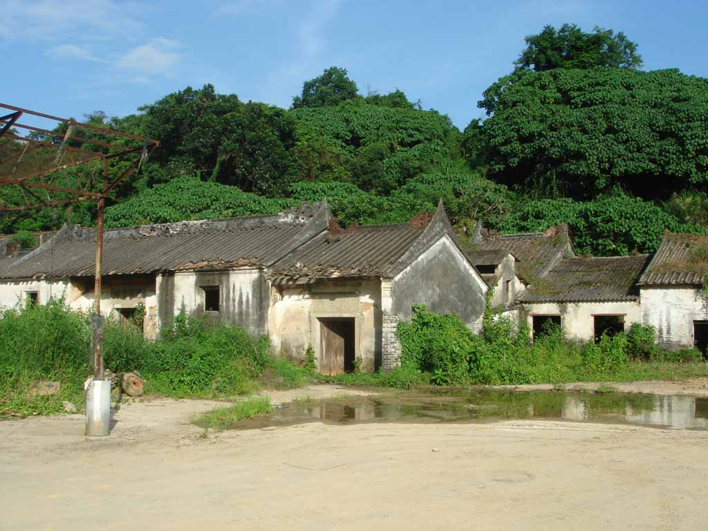 中文（香港）: 達德公所。